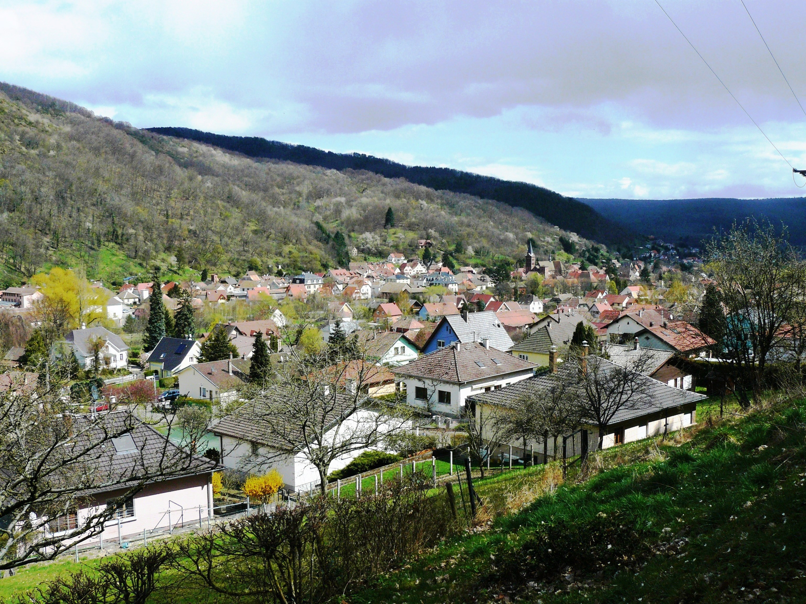 Lautenbach 135.JPG